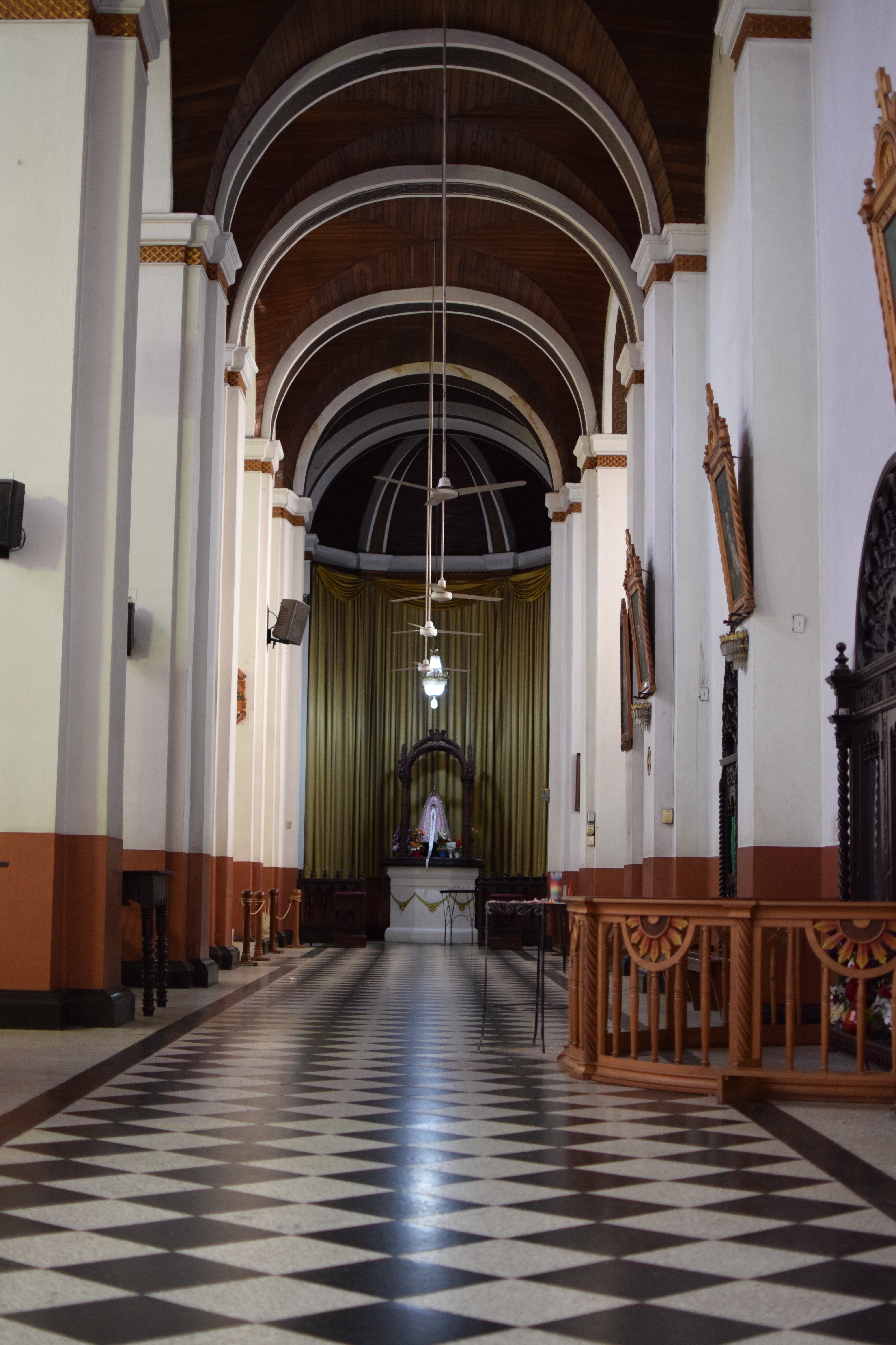 Interior de la Catedral de Santa Cruz de la Sierra (Zona lateral Oeste). This medium shows the protected monument with the number S/00-040 in Bolivia.